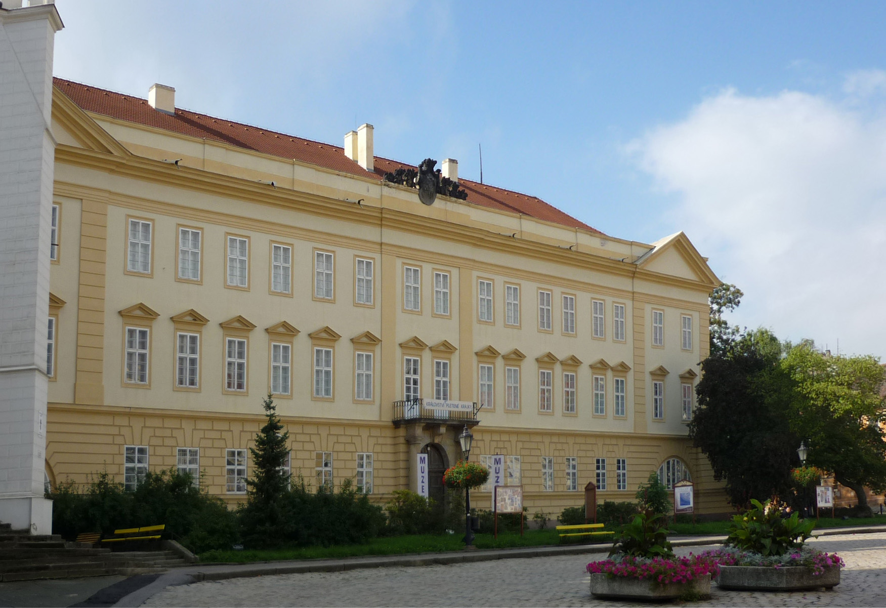 Schloss Teplitz, jetzt Städtisches Museum Teplice